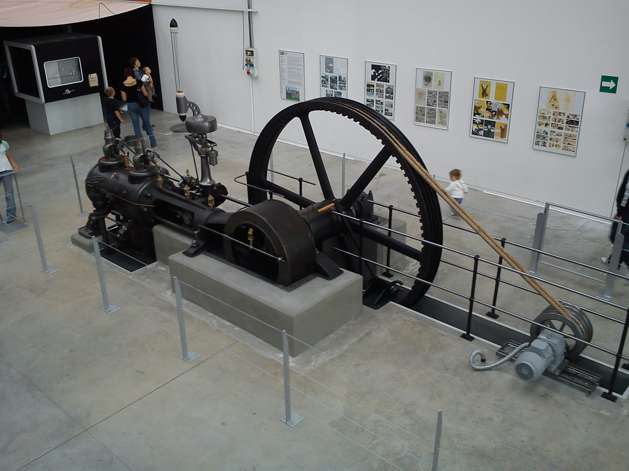 Parní stroj MARX v Techmania Science Center v Plzni